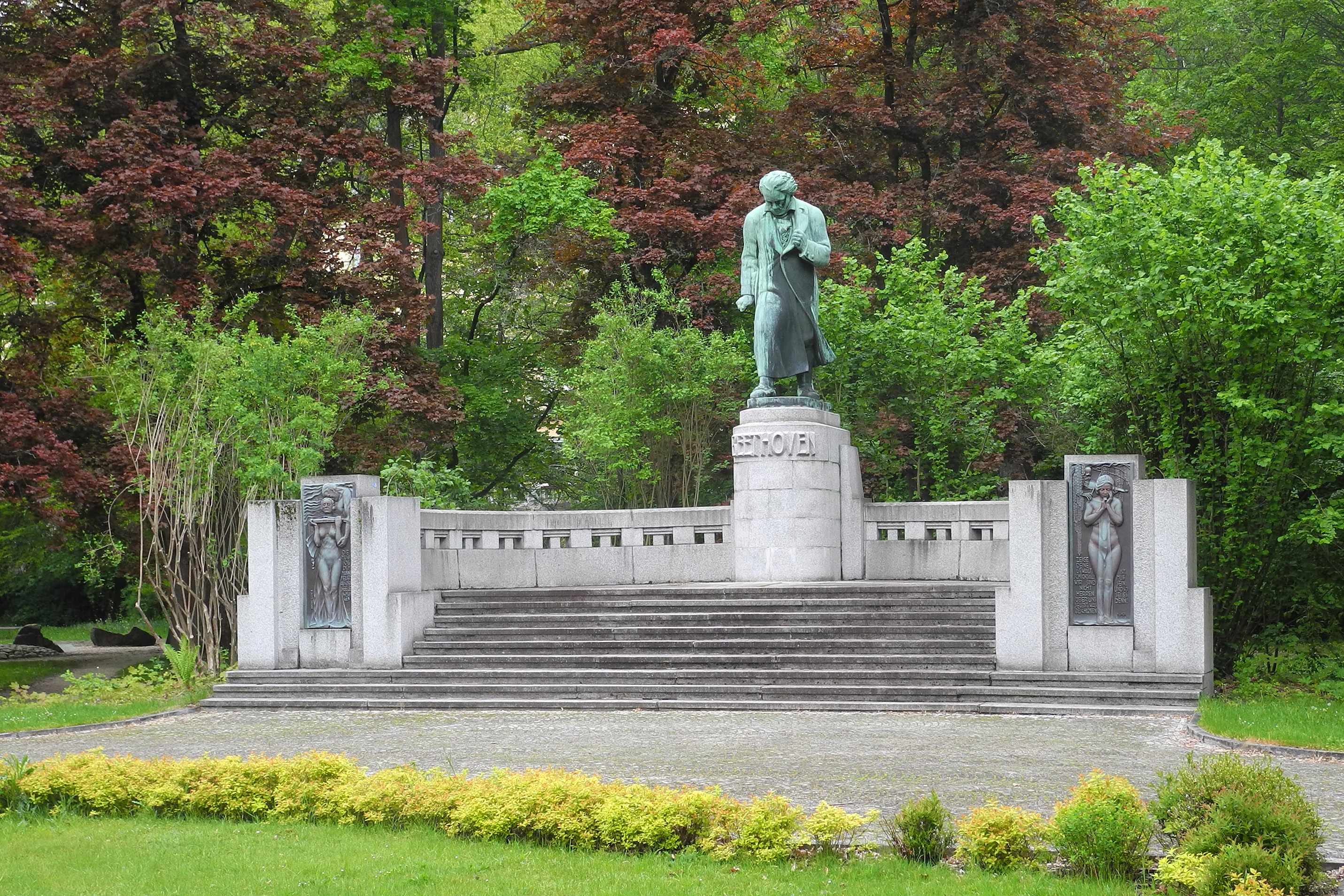 Beethoven-Denkmal in Karlsbad (Karlovy Vary) vom Bildhauer Hugo Uher (1929)